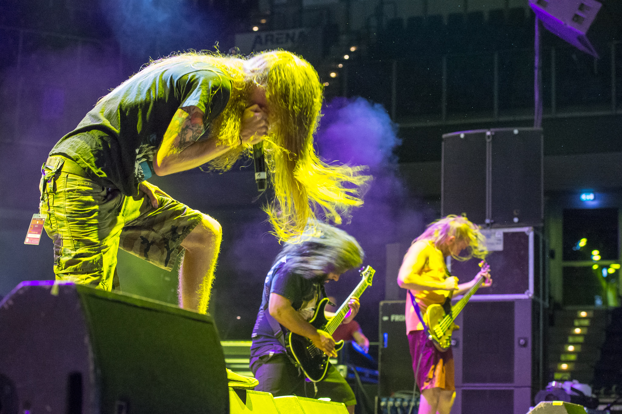 ARGO-Konzerte,Arena Nürnberger Versicherungen,Battlecross,Clubstage,Don Slater,Hiran Deraniyagala,Konzert,Kyle “Gumby” Gunther,Livekonzert,Livemusik,Musik,RiP,Rock im Park 2014